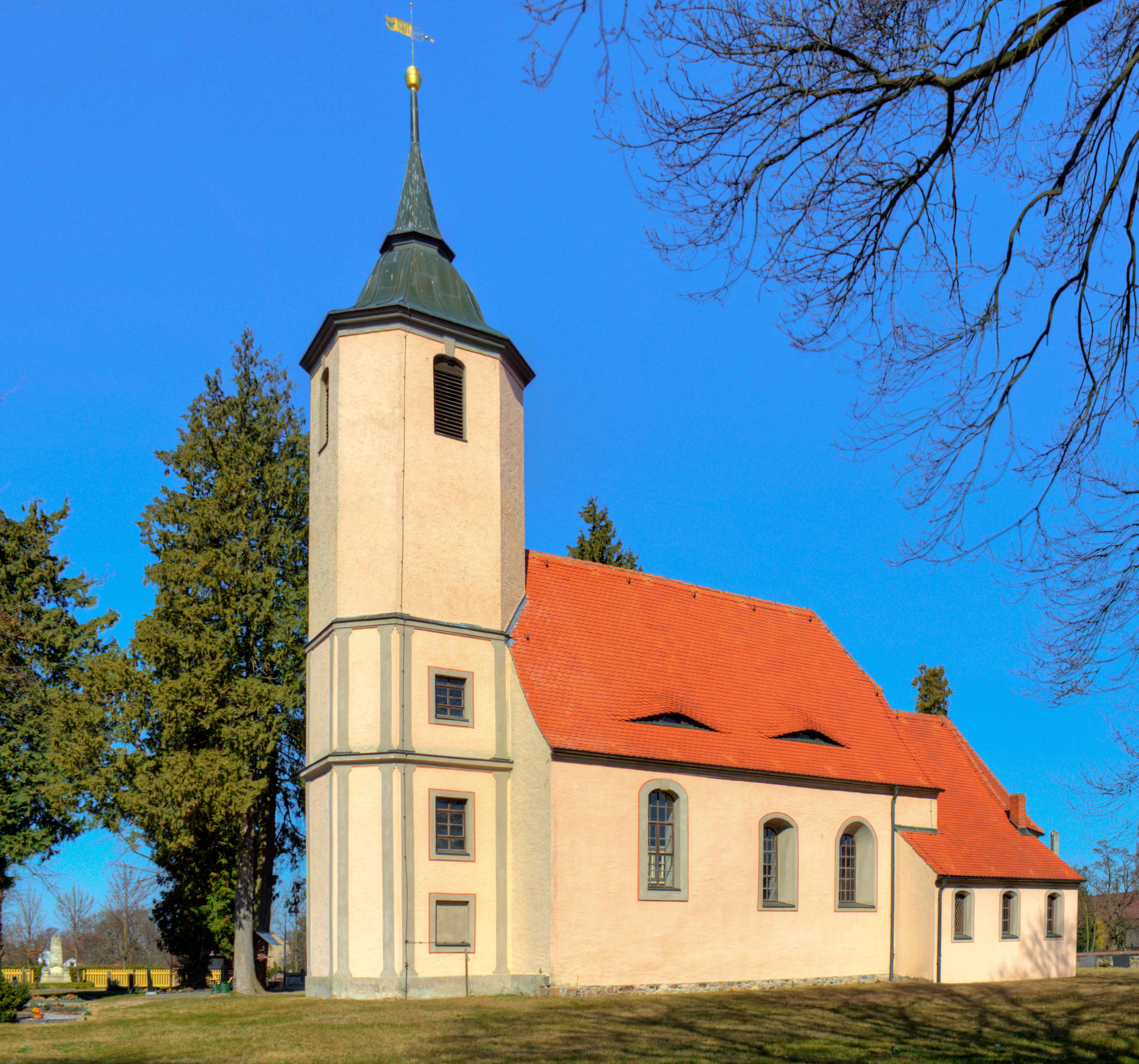 Kirche, Dorfallee 1 in Belgern-Schildau OT Taura